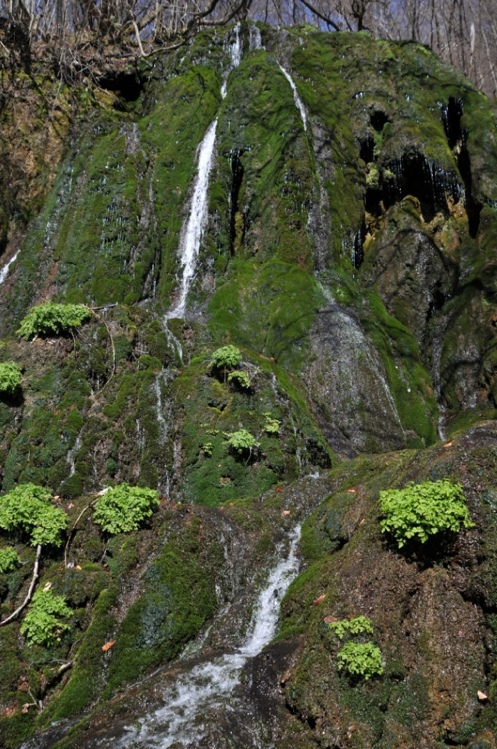 Sem avtor fotografije.